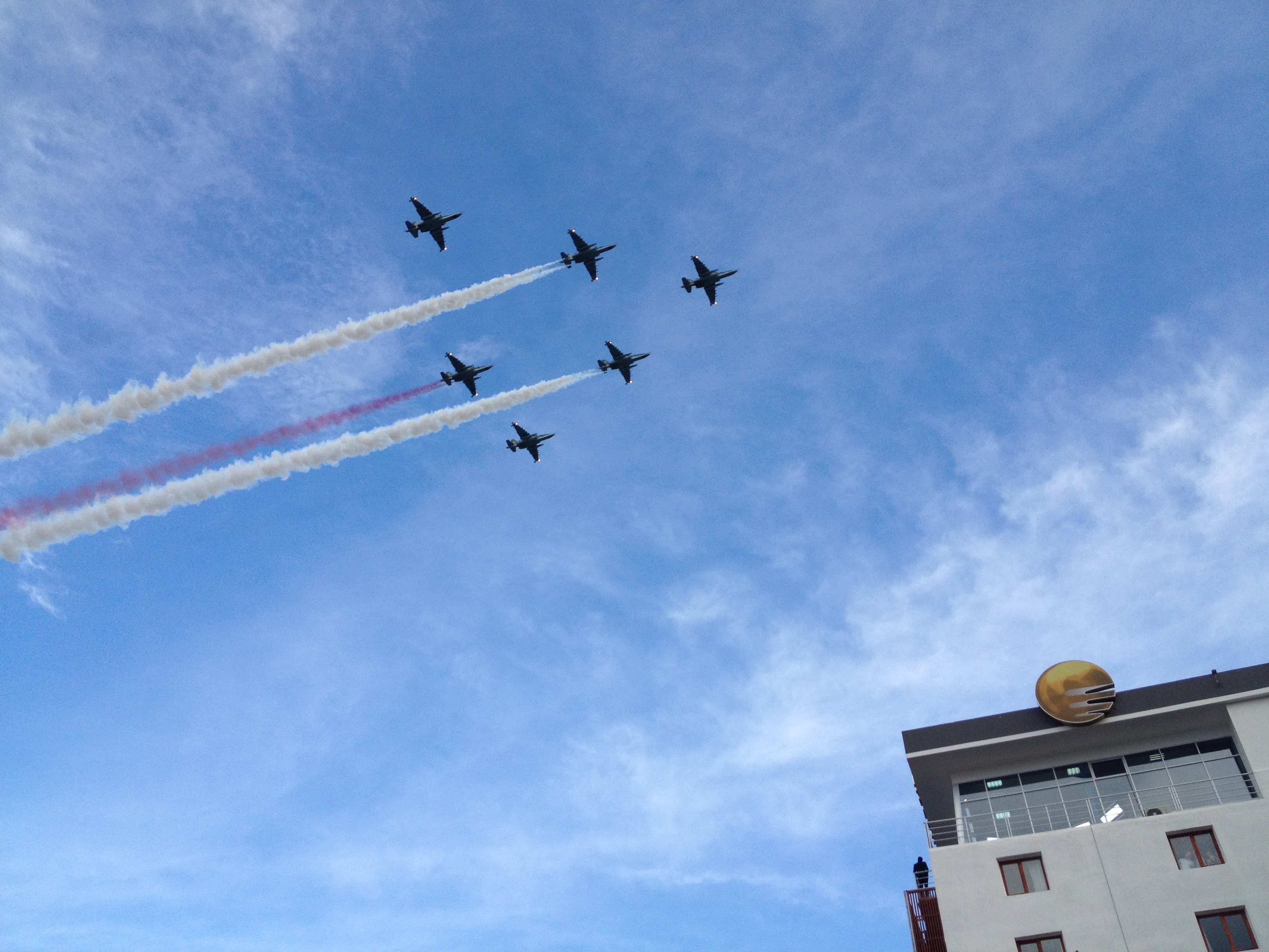 Georgian Independence Day parade, 2012